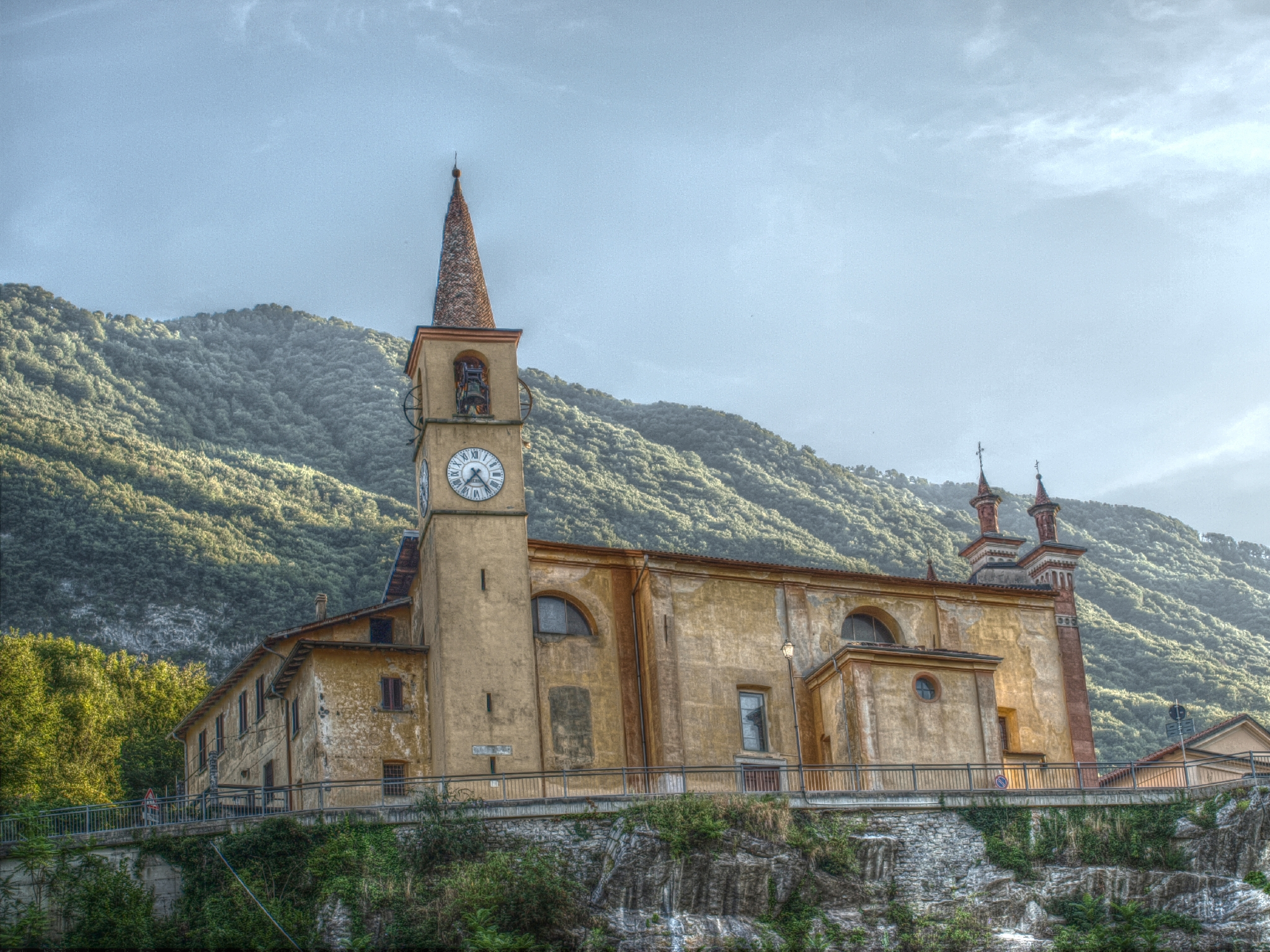 Presa da valle della chiesa dei Santi Vito e Modesto, Bene Lario, Como, Italia